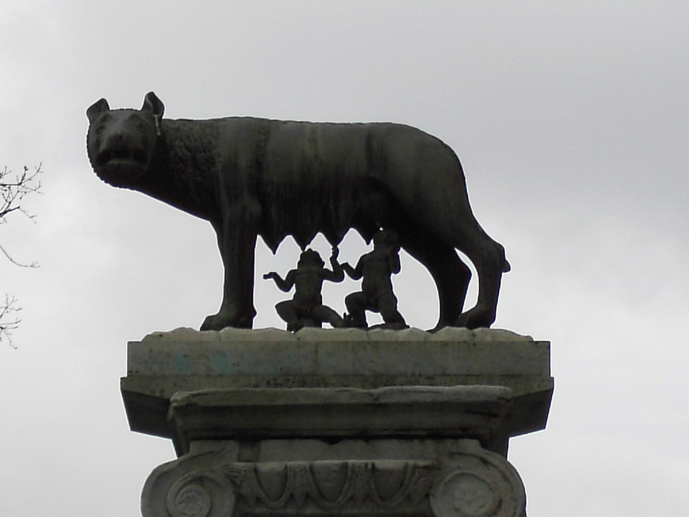 Roma, "Lupa capitolina" - la lupa sulla piazza del Campidoglio (by la_lupa)